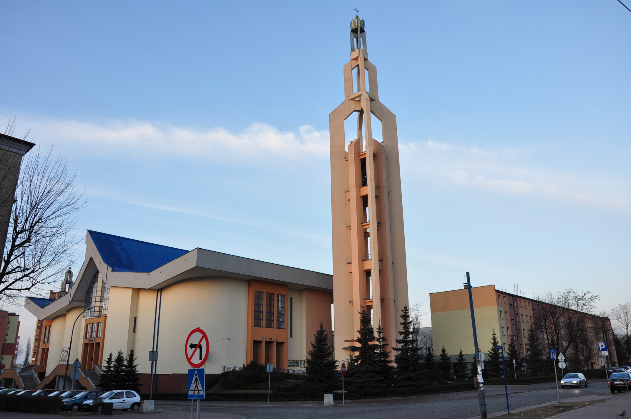 Jaworzno; Osiedle Stałe. Sanktuarium Matki Bożej Nieustającej Pomocy.